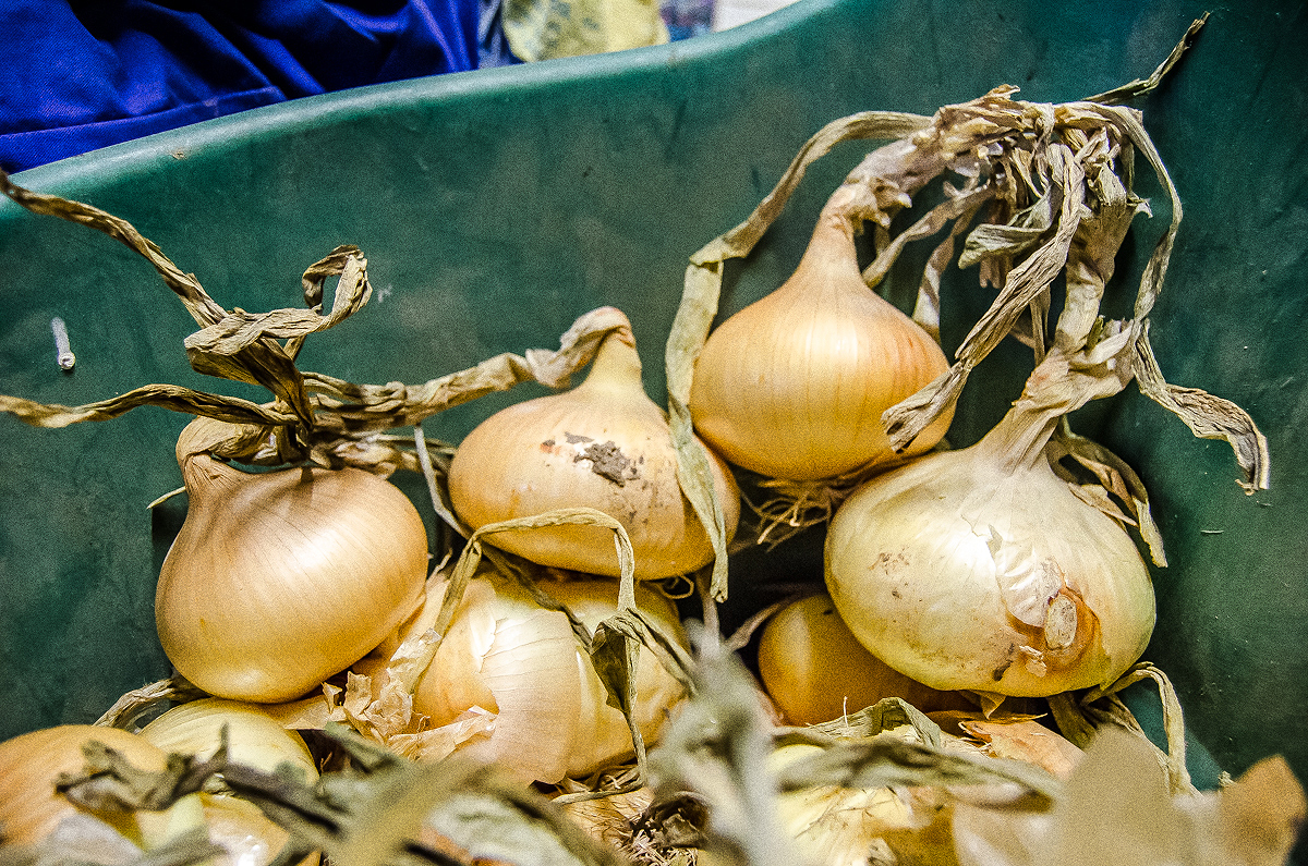 Cebollas horcales crudas preparadas para ser picadas para hacer morcillas.